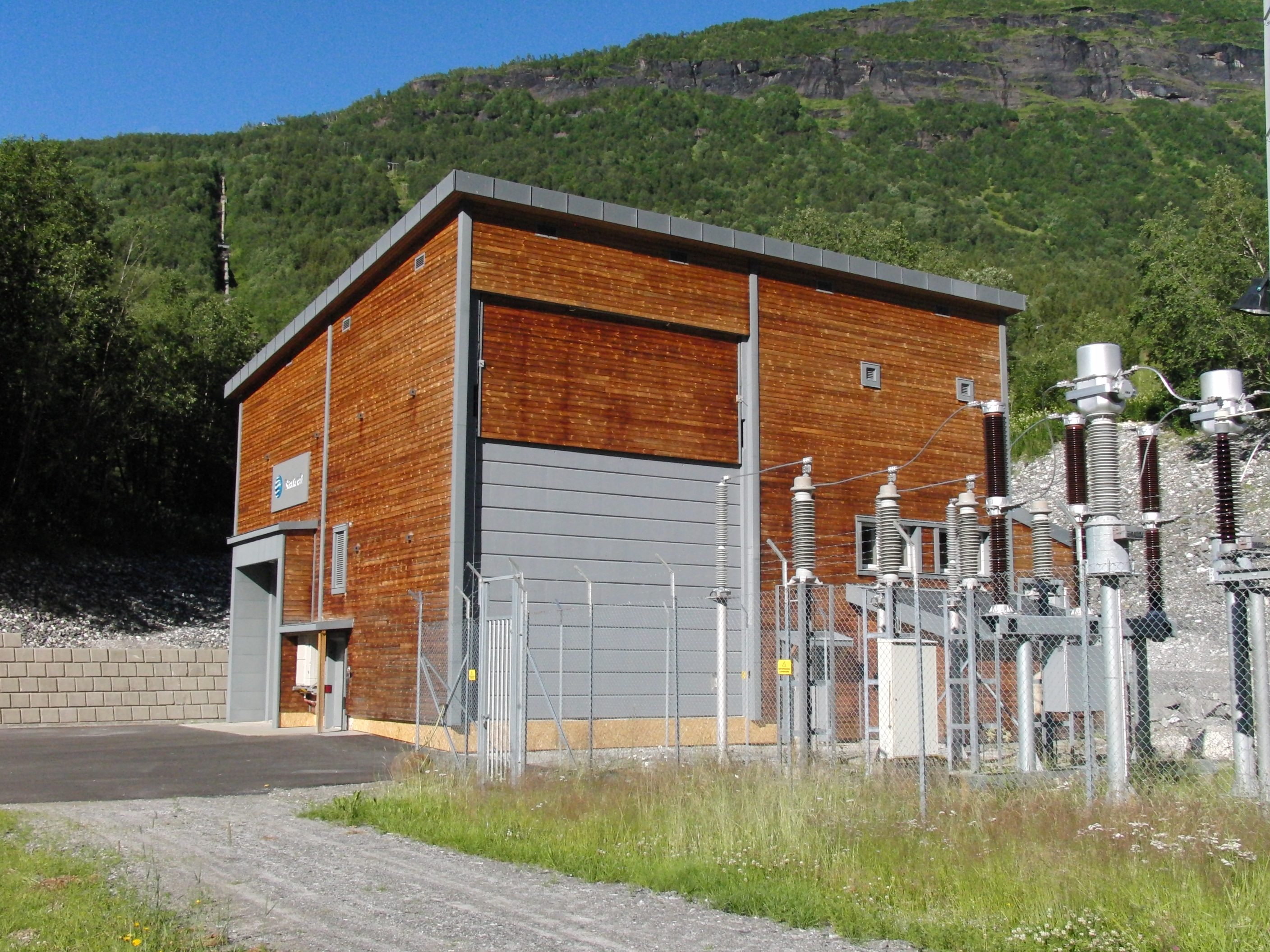 Bjerka kraftverk